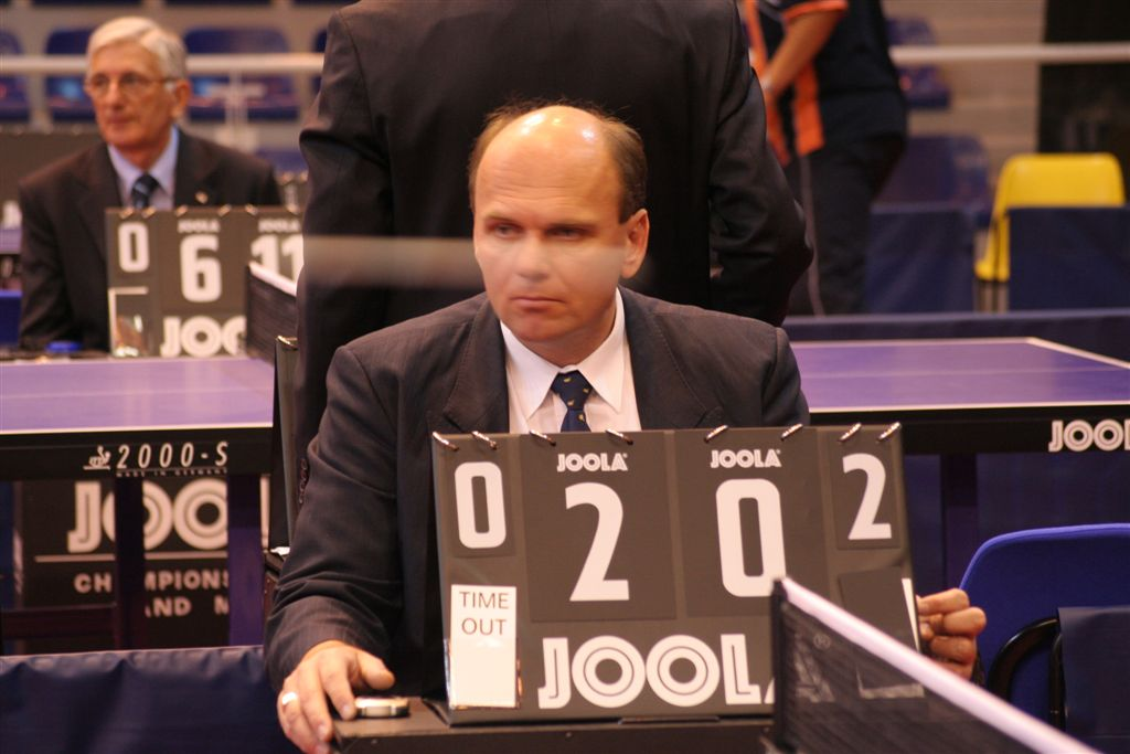 Table tennis umpire.